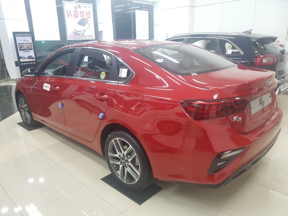 기아 K3(2세대) 후측면